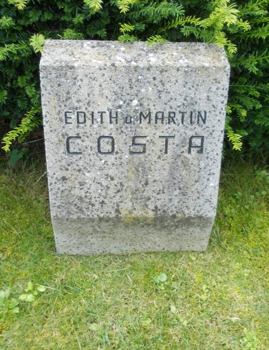 Martin Costa-Feuerhalle Simmering (5-8-122)